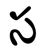 сакараму